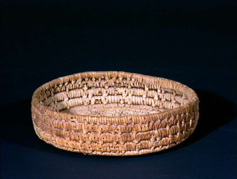 Osteteie fra Rana i Nordland. Foto Anne-Lise Reinsfelt / Norsk Folkemuseum, NFL.05555.